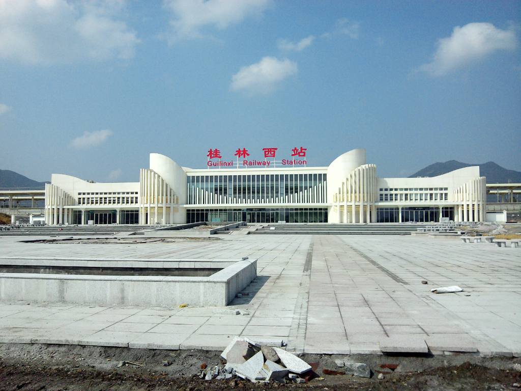 桂林西站。